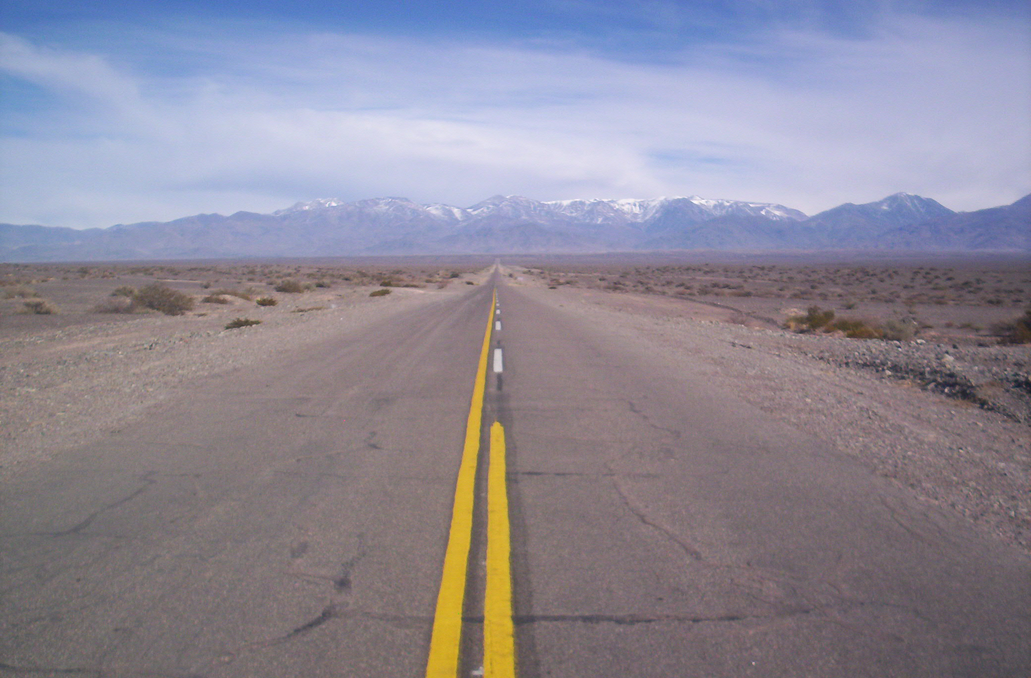 Vista de la Ruta Nacional 150, antes del Paso Internacional Agua Negra, departamento Iglesia, provincia de San Juan, Argentina